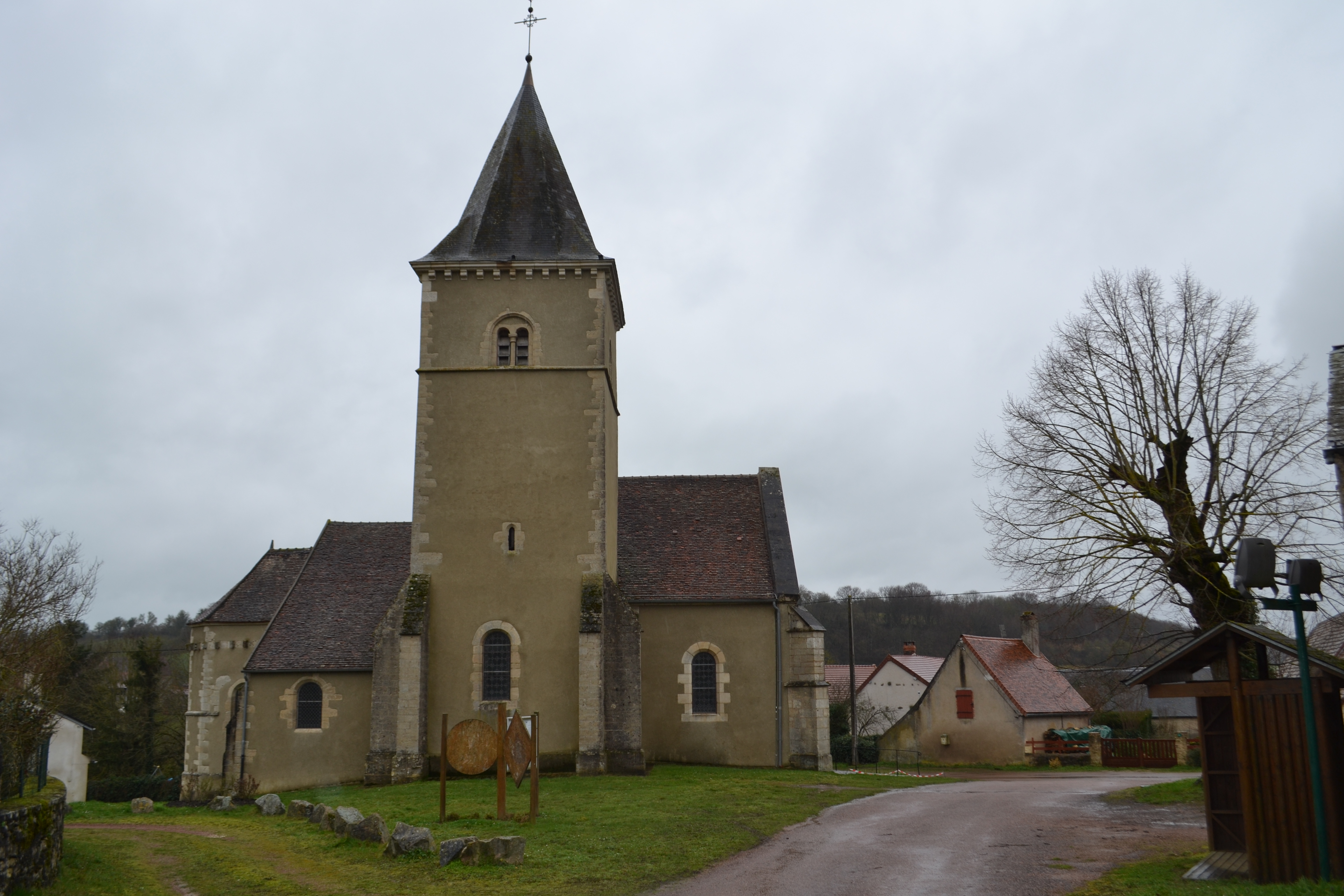 Eglise de Oulon (Nièvre).